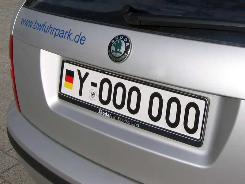 Ein Škoda Fabia I mit dem KFZ-Kennzeichen der Bundeswehr, zur Verfügung gestellt durch BwFuhrparkService. Zahlen auf dem Kennzeichen durch Nullen ersetzt.